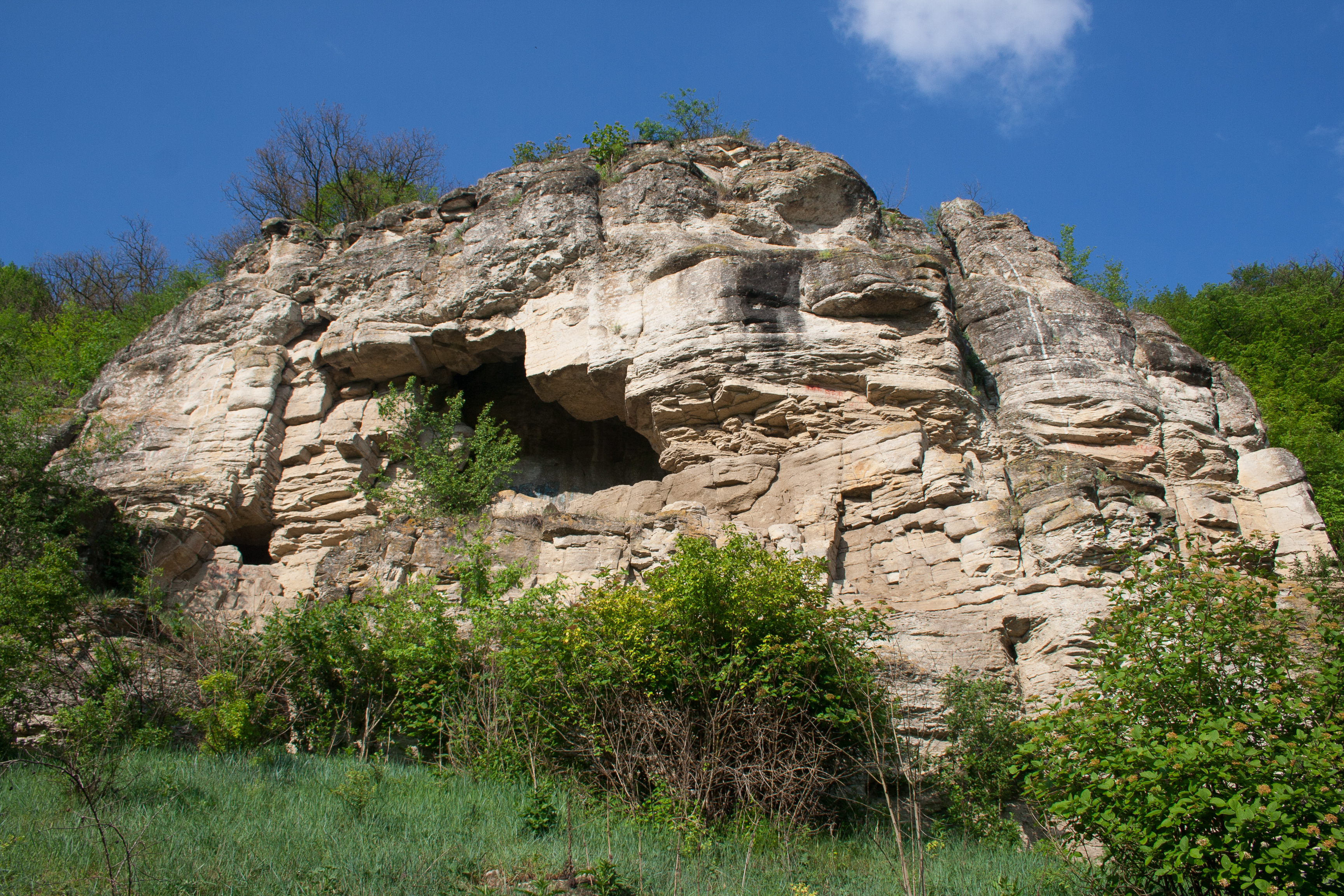 Нігинська товтра, Кам'янець-Подільський район, поблизу с. Нігин